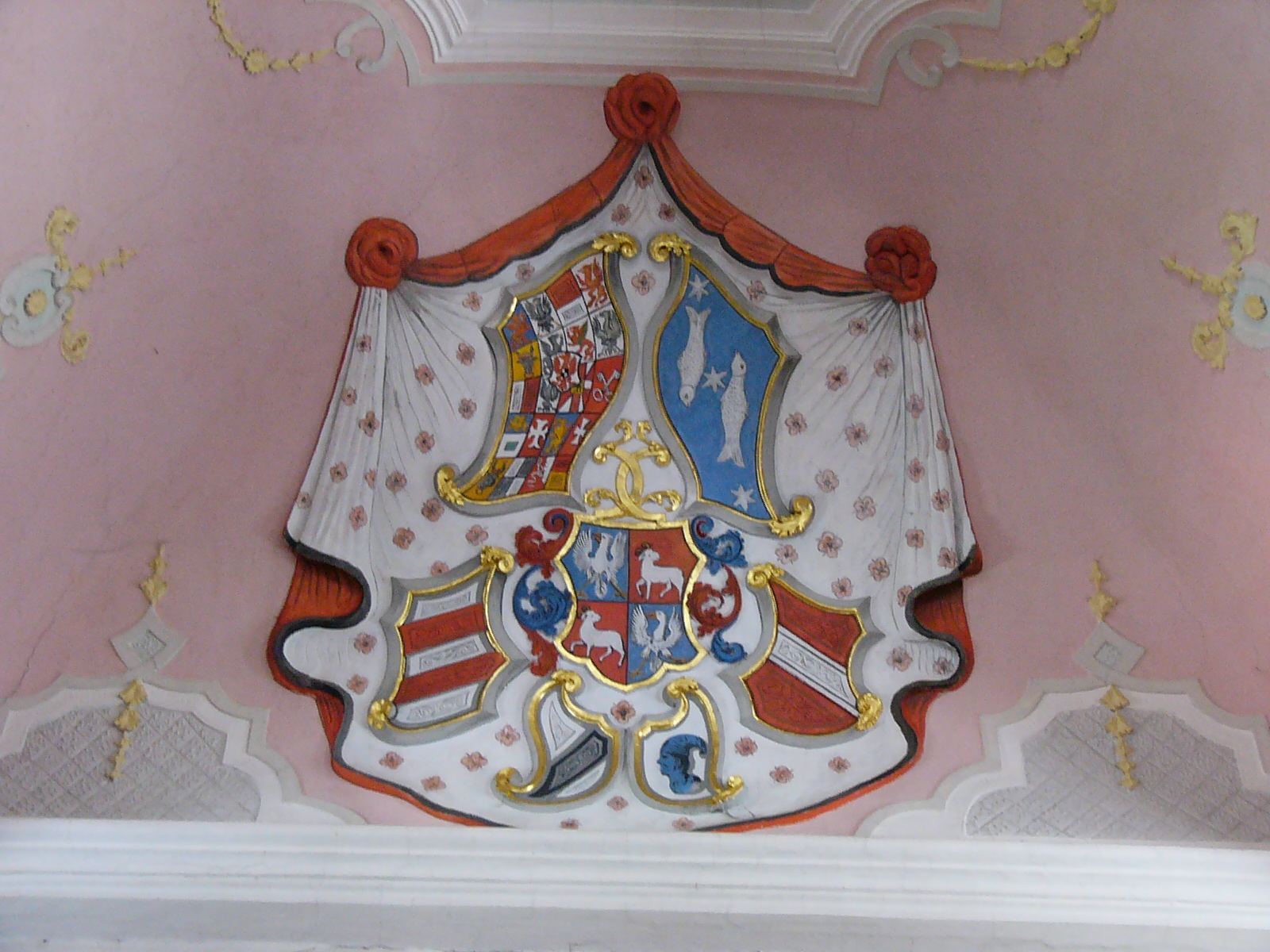 Wappenensemble (nach 1733). Familien Brandenburg-Kulmbach, Lutz, Schönburg, Kotzau und Stein.